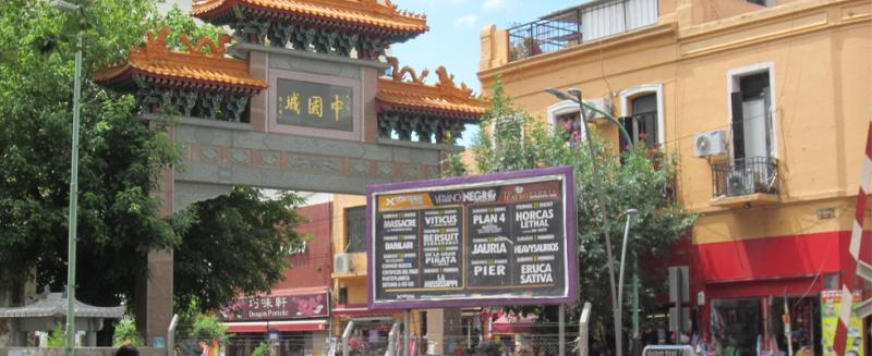 Barrio Chino de Buenos Aires, ubicado en el barrio de Belgrano.